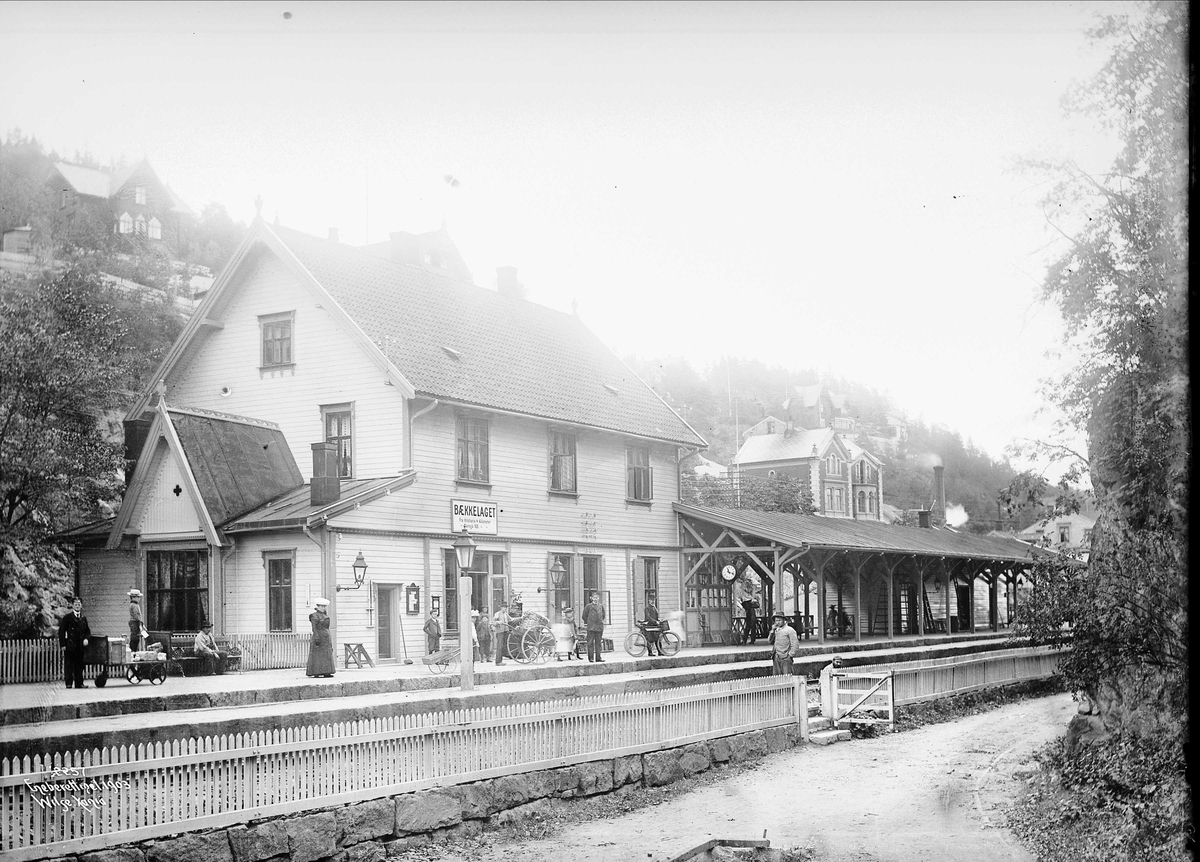 Bekkelaget stasjon var en jernbanestasjon på Østfoldbanen i Oslo kommune.